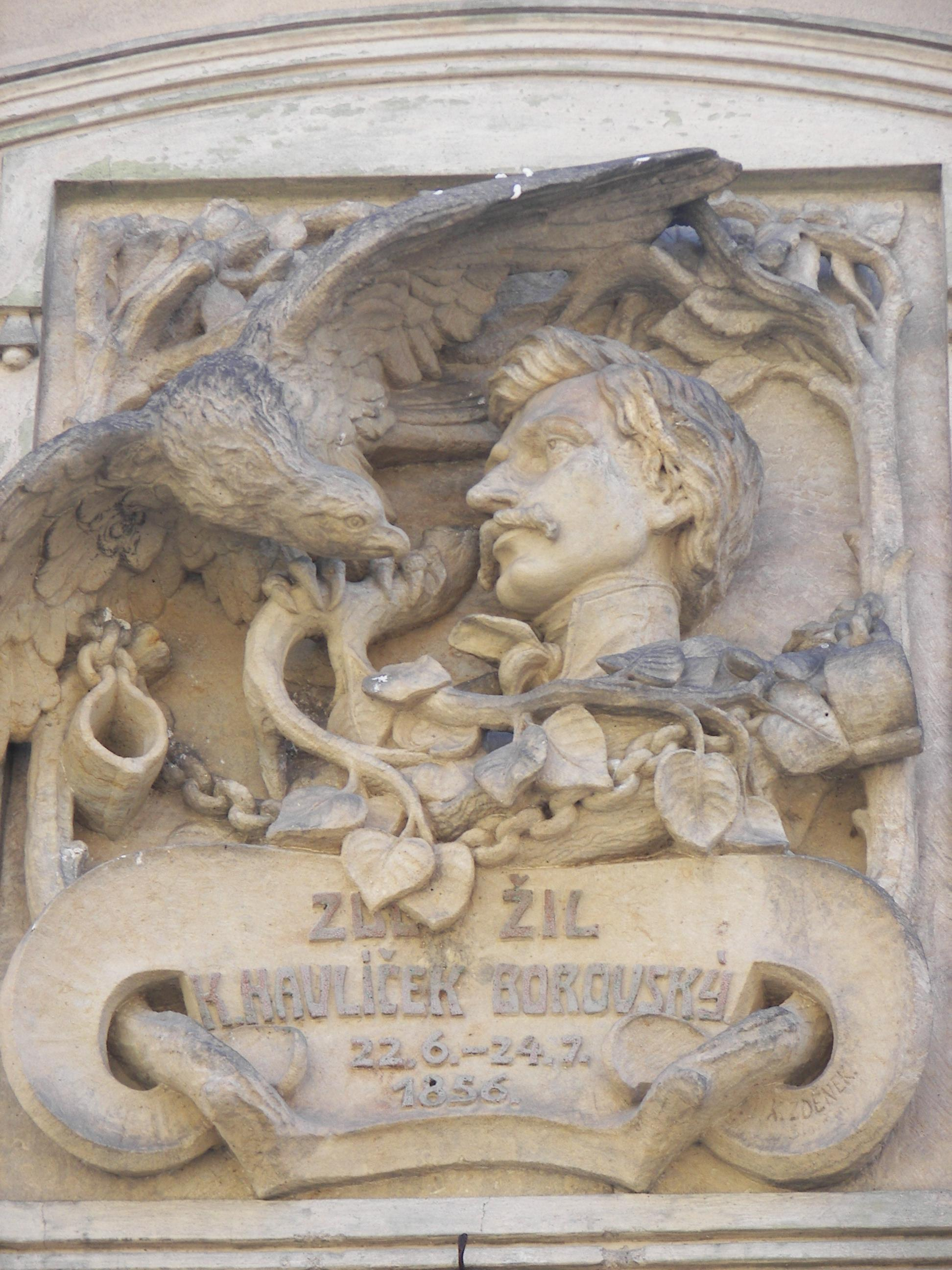 Znak na vile K. H. Borovského